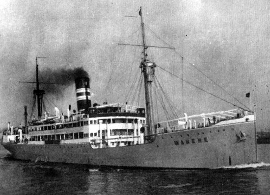 Der Dampfer WAHEHE des Deutschen Afrika Dienstes